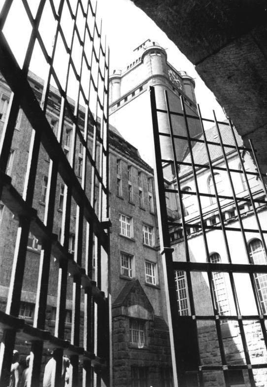 Dresden, Landgericht, Innenhof ADN-Häßler 15.5.1990 Dresden: Hinrichtungsstätte im ehemaligen Landgericht, hier ein Blick in den Innenhof. Von 1952 bis 1968 wurden in Dresden-Volkewitz politische Häftlinge enthauptet und ihr Totenschein gefälscht.